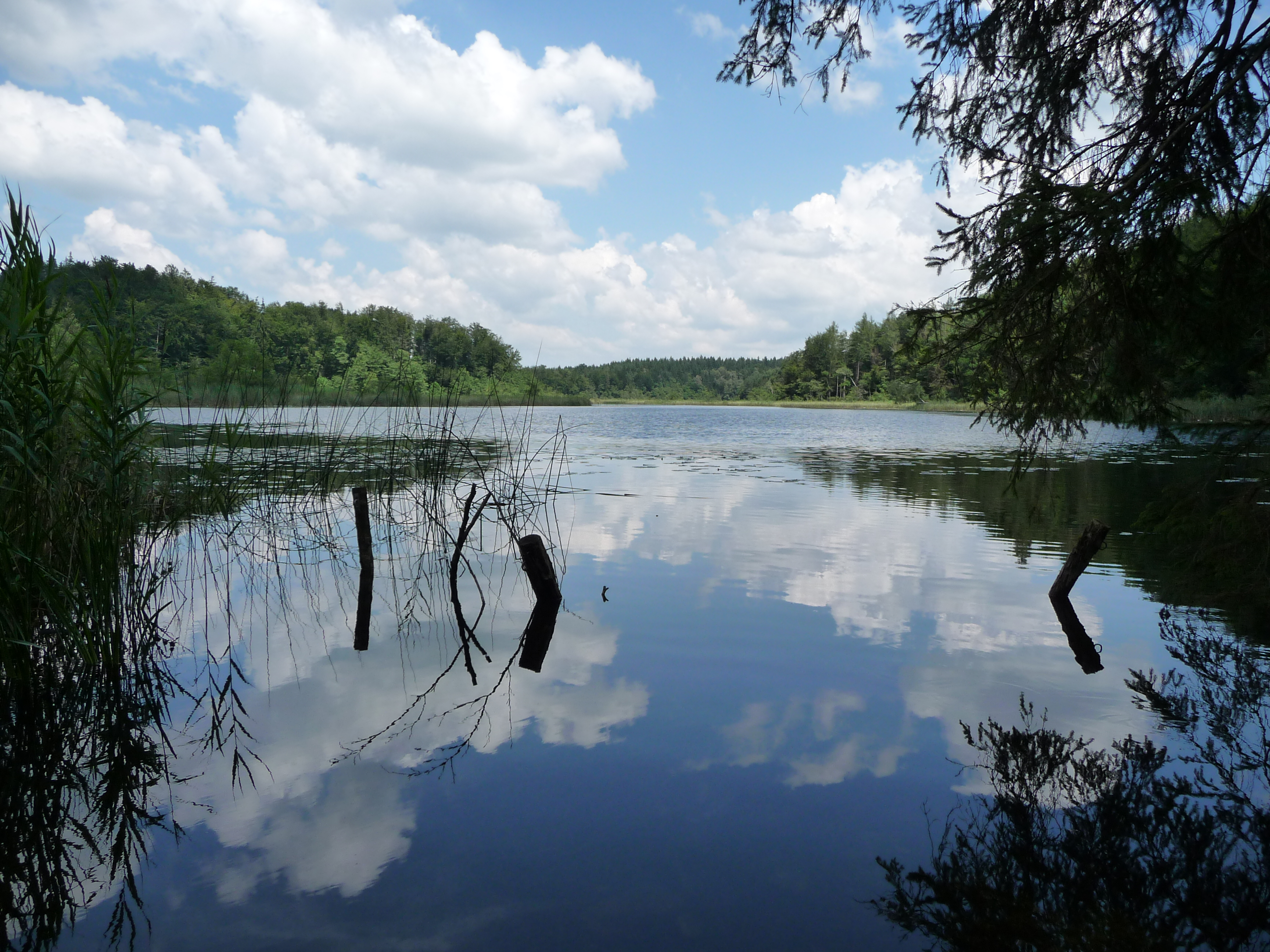 Eggstätt-Hemhofer-Seenplatte, Kautsee